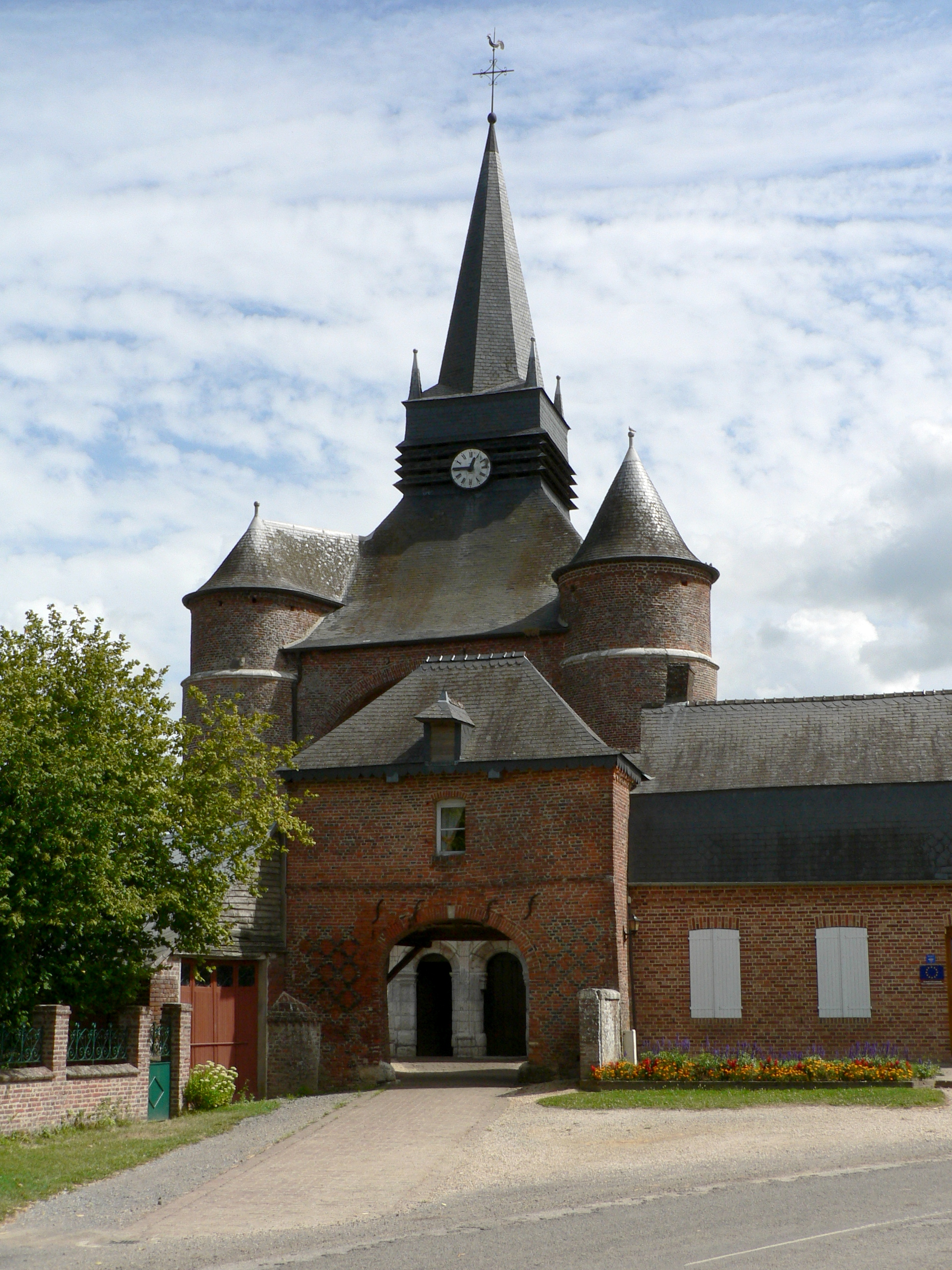 Église fortifiée de Parfondeval, Aisne, France